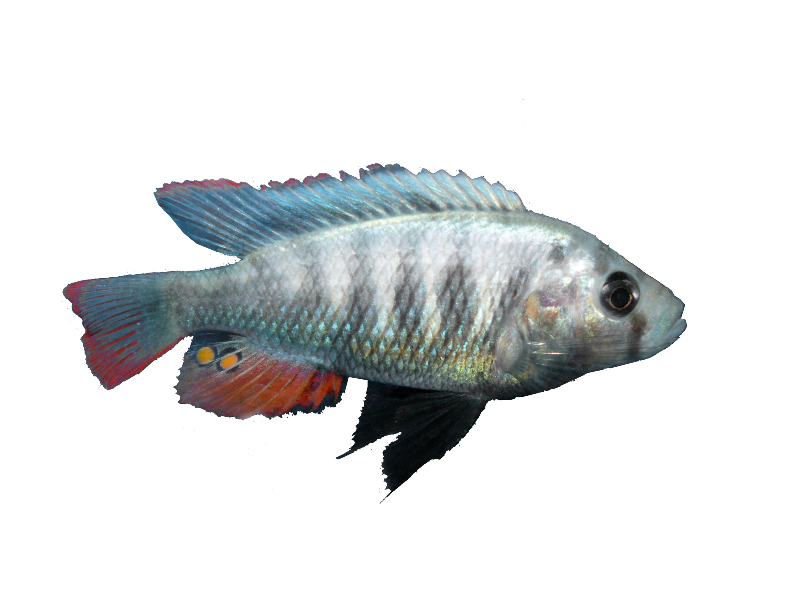 Pundamilia pundamilia